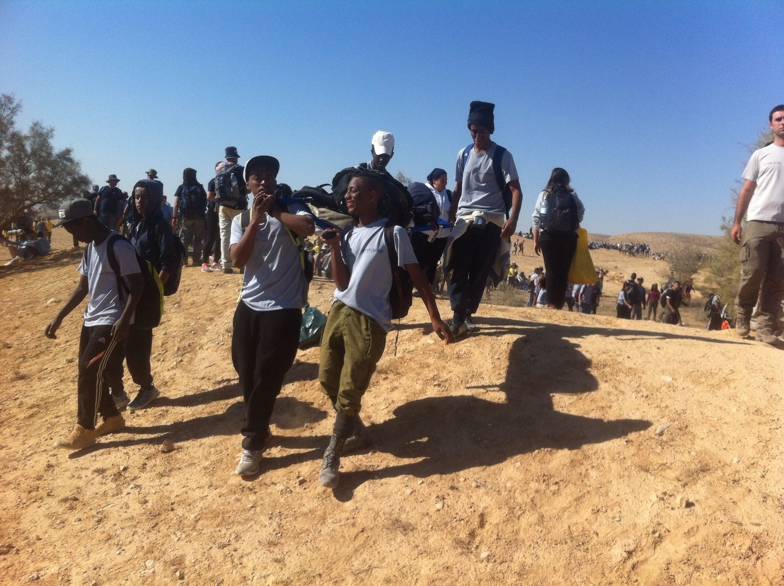 קבוצת הכנה לגיוס לצה"ל במסגרת תכנית "נתיבים" ובהפעלה של עמותת "אחרי!"